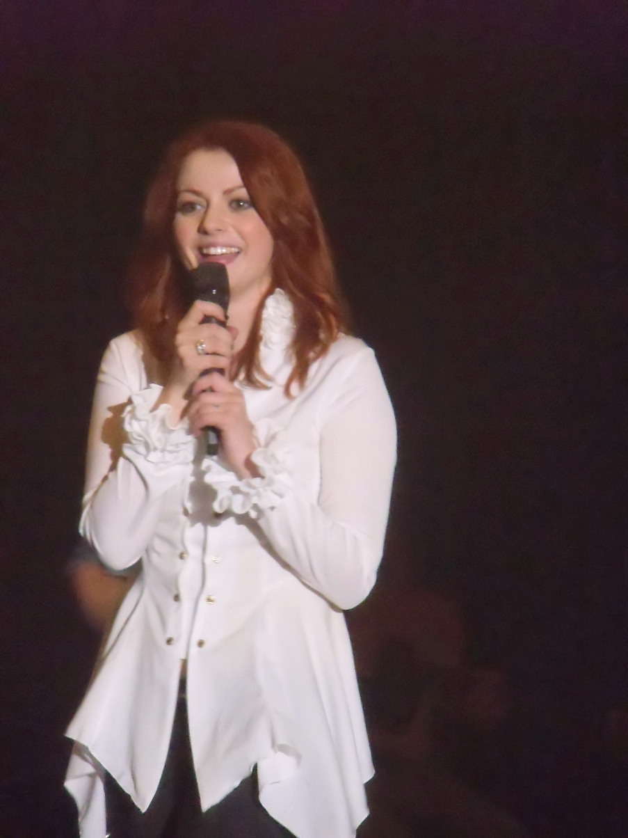 Annalisa Scarrone durante un concerto presso l'Auditoriom della Conciliazione a Roma il 27 ottobre 2012.